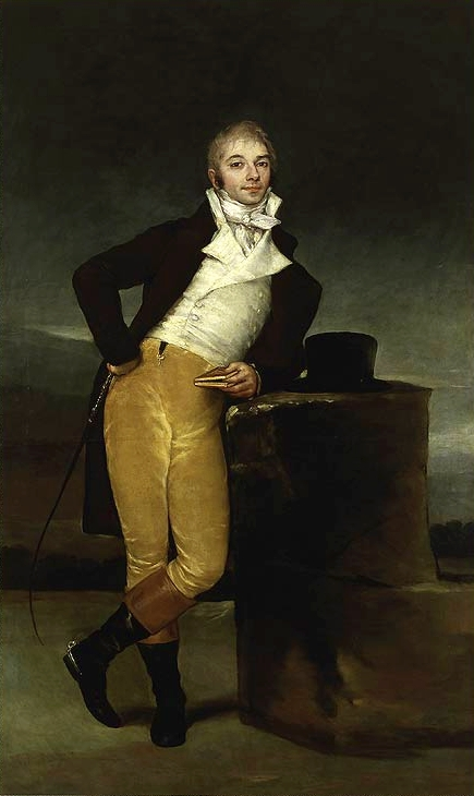 Retrato del aristócrata español José María Magallón y Armendáriz (1763-1845), marqués de San Adrián y de Castelfuerte y señor de Monteagudo.